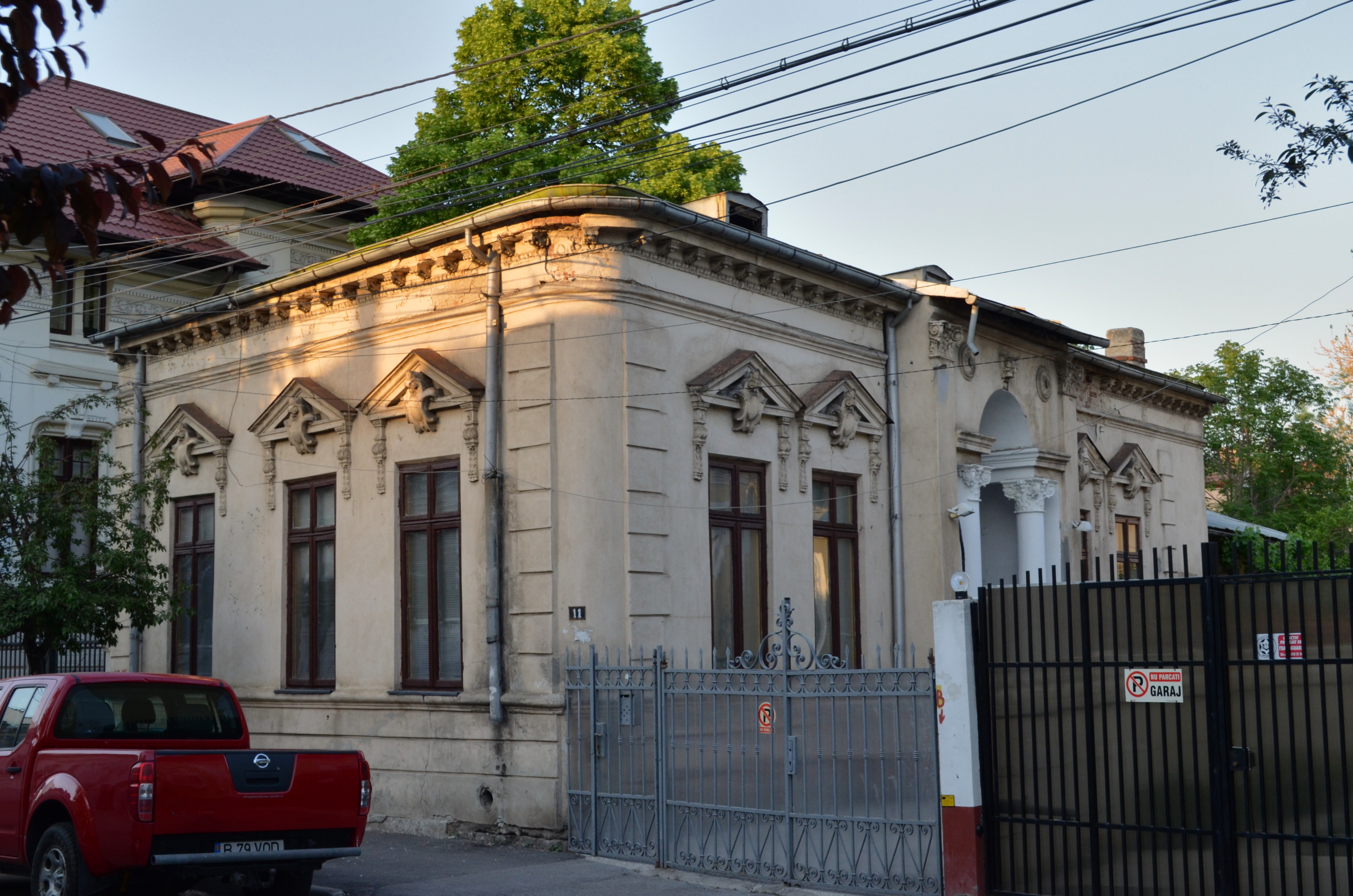 Casă, Strada Parfumului nr. 11, Sector 3, București